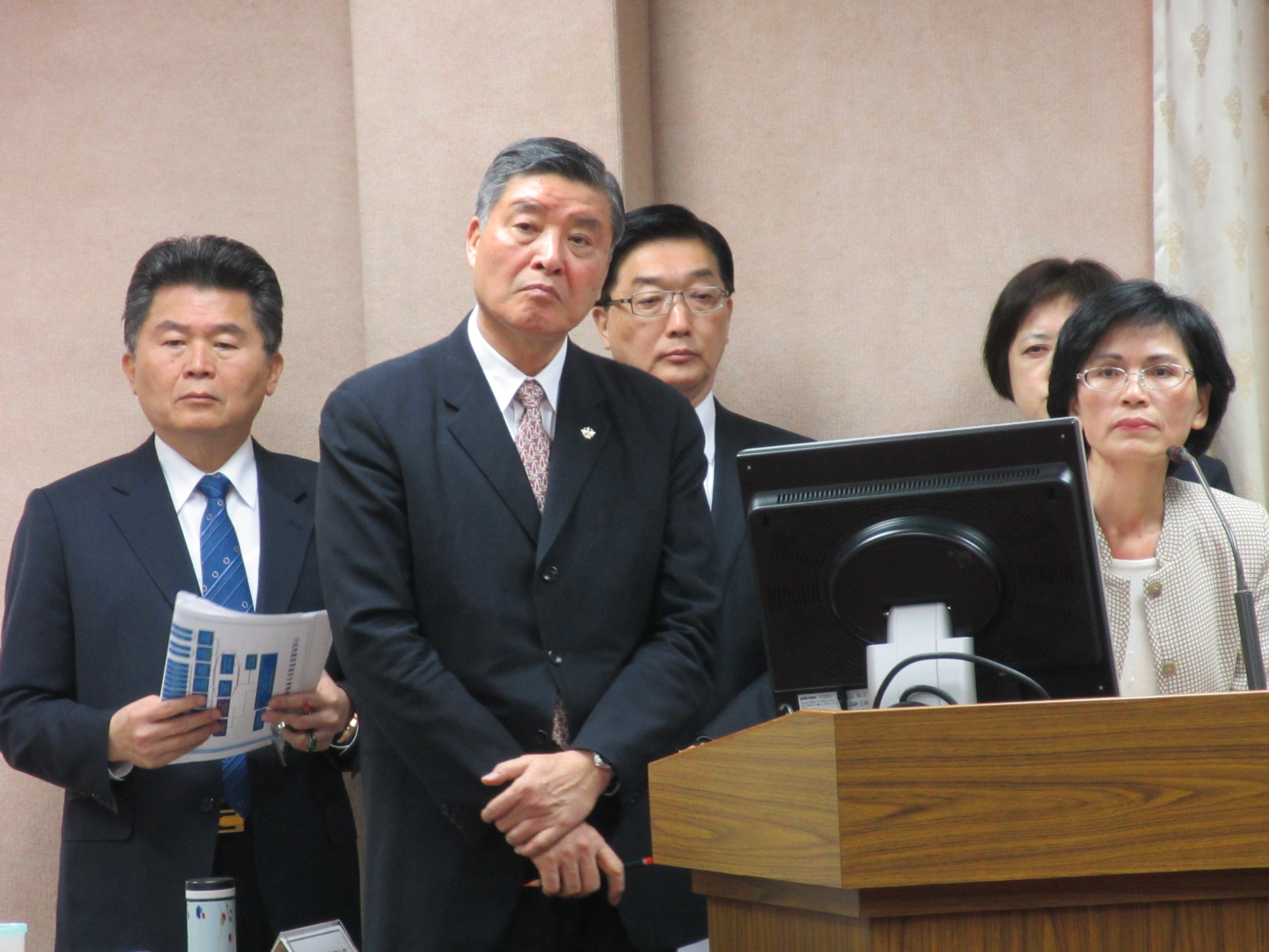 台灣國防部長高華柱和國安官員在立法院接受質詢。